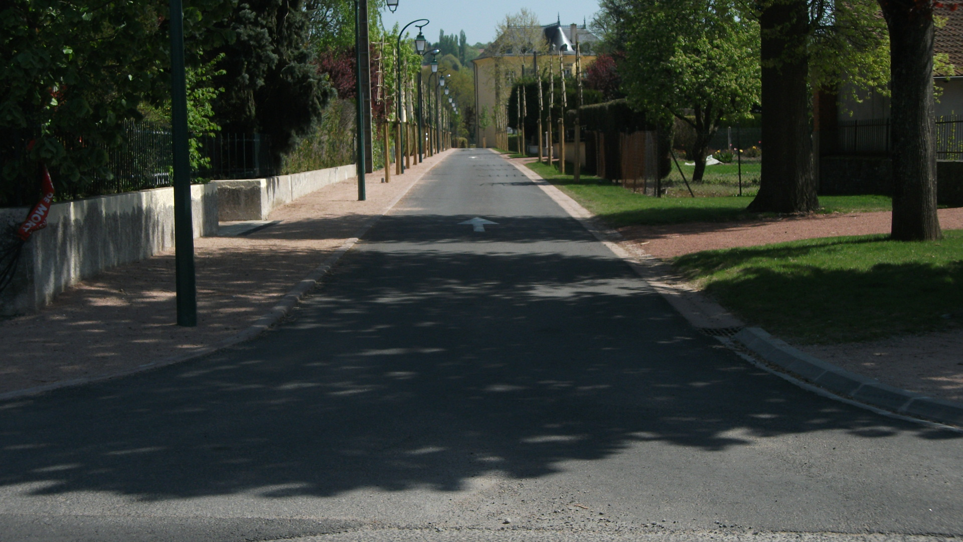 Rue de la Mairie, Hauterive, Allier, Auvergne, France. Cette rue a été refaite dans le cadre d'un aménagement communal en 2010, mise à sens unique.